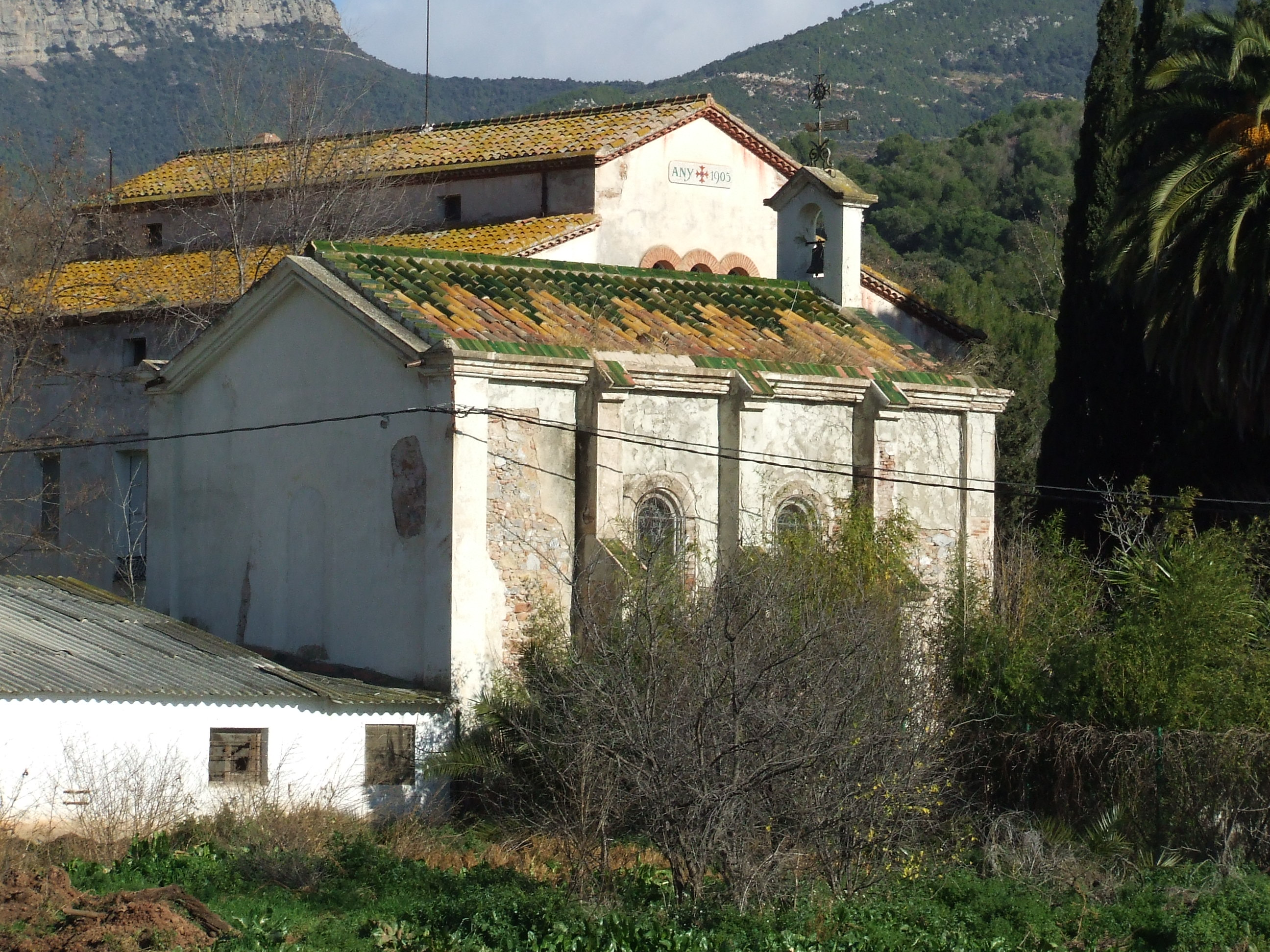 La Mare de Déu de Montserrat de Can Noguera (Bigues, Bigues i Riells, Vallès Oriental)